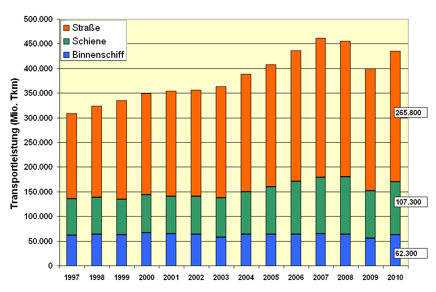 gewerblicher Gütertransport in Deutschland (ohne Werkverkehr) 1997 bis 2010, Quelle: Stat. Bundesamt, Genesis-online Bereich 46 Verkehr